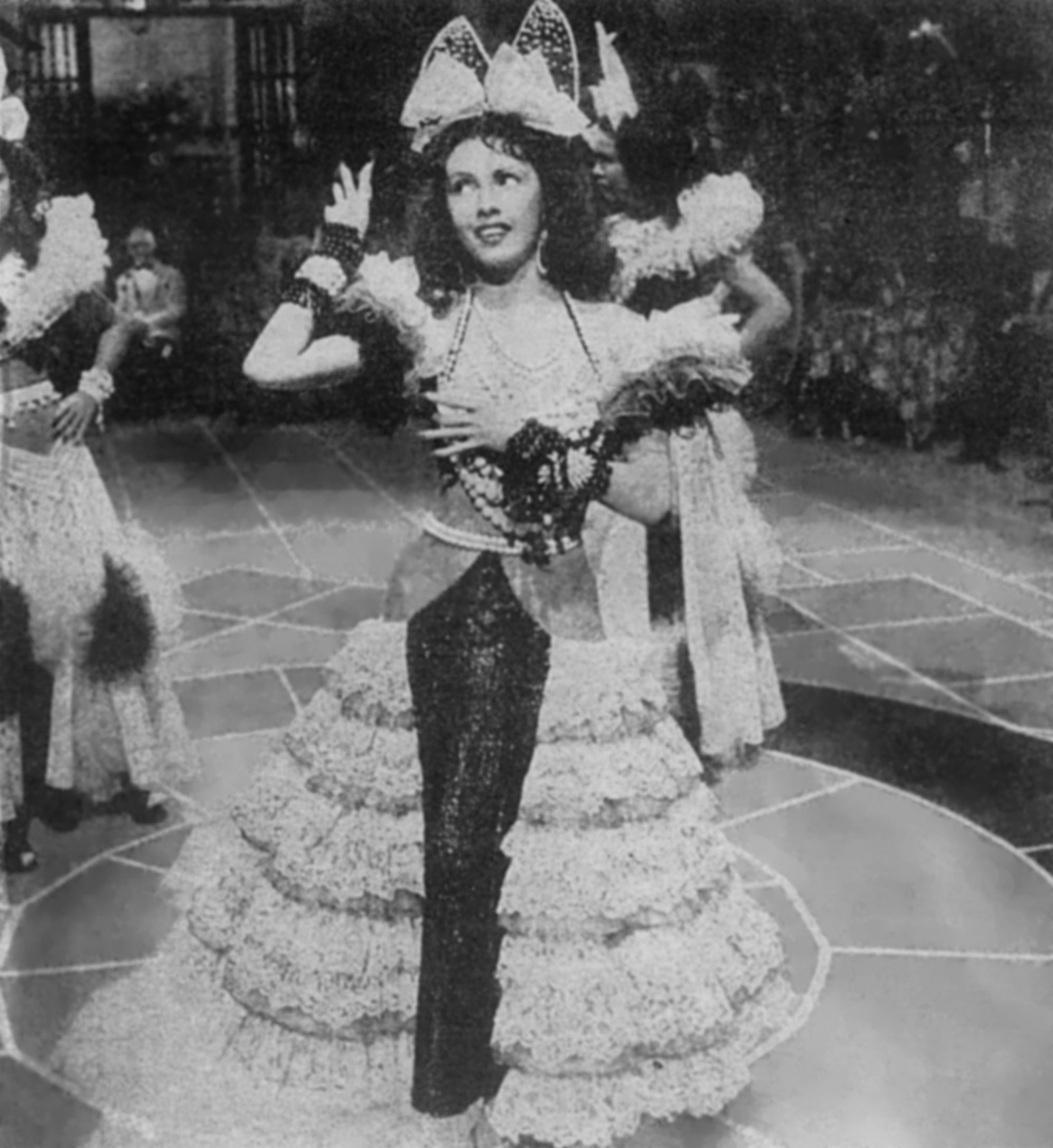 A bailarina brasileira Eros Volúsia, fotografada durante as filmagens de Rio Rita (1942).